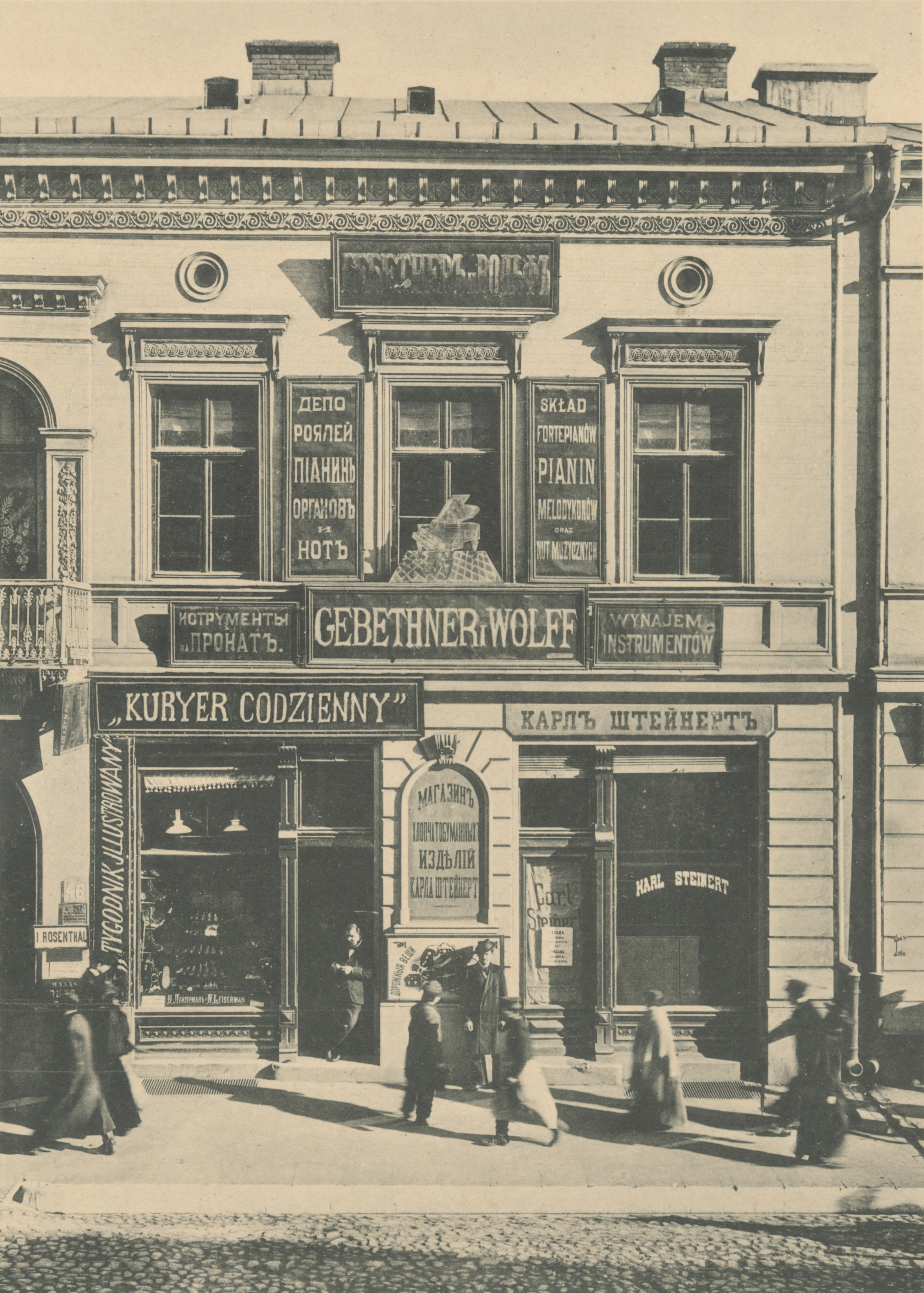 Fotografia przedstawia kamienicę znajdującą się pod adresem Piotrkowska 46. Fotografia pochodzi z wydanego w 1896 roku albumu Bronisława Wilkoszewskiego „Widoki m. Łodzi”. Saryusz Bronisław Paweł Wilkoszewski (1847-1901), zwany "łódzkim Canaletto" był mistrzem fotografii ilustracyjnej. Udokumentował zabudowę Łodzi z końca XIX wieku przede wszystkim wille, fabryki, budynki użyteczności publicznej, obiekty sakralne, ulicę Piotrkowską. Jego zakład fotograficzny znajdował się w willi "Trianon" w Pasażu Meyera 5 (obecnie ulica Moniuszki).